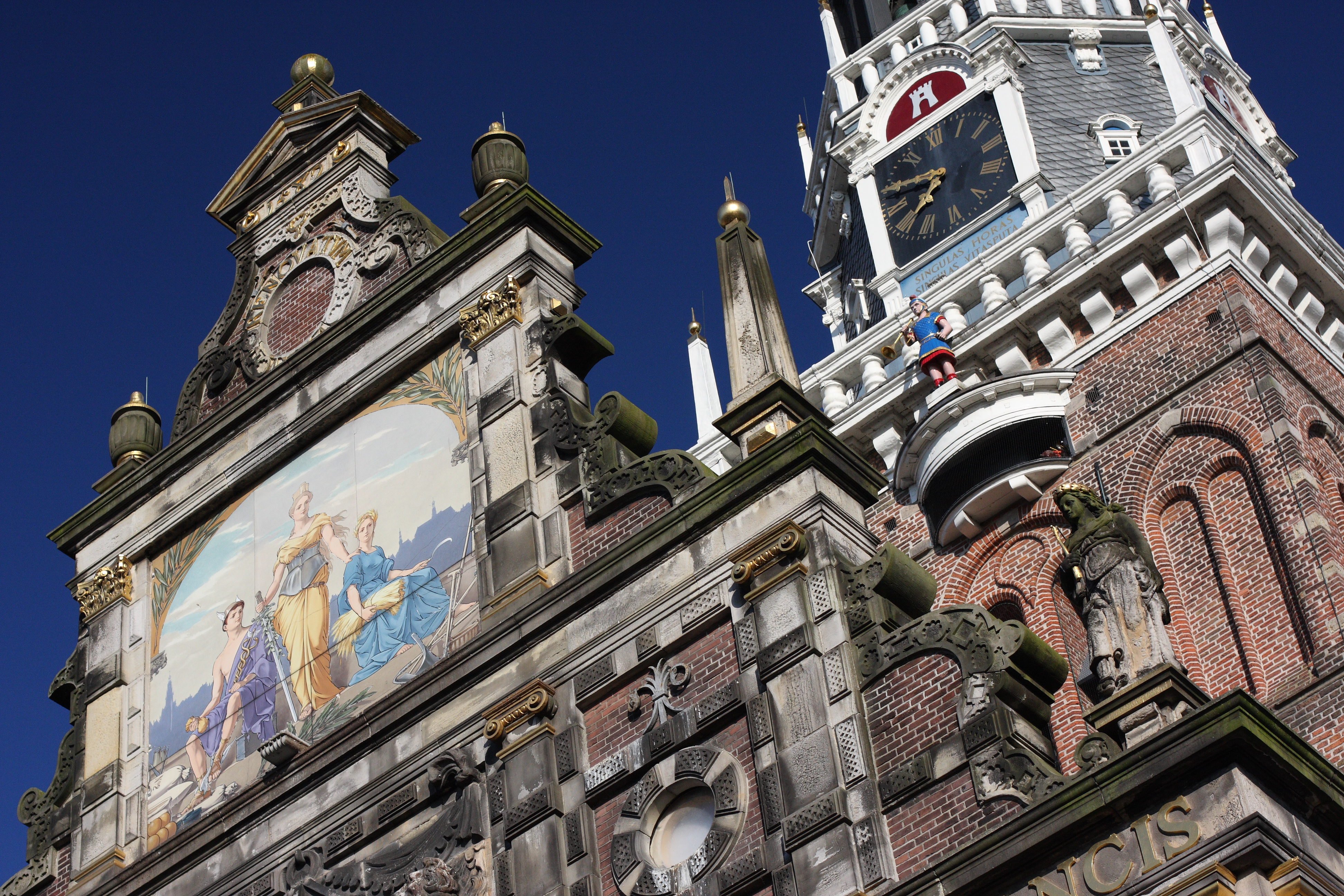 Waag, Alkmaar, Netherlands